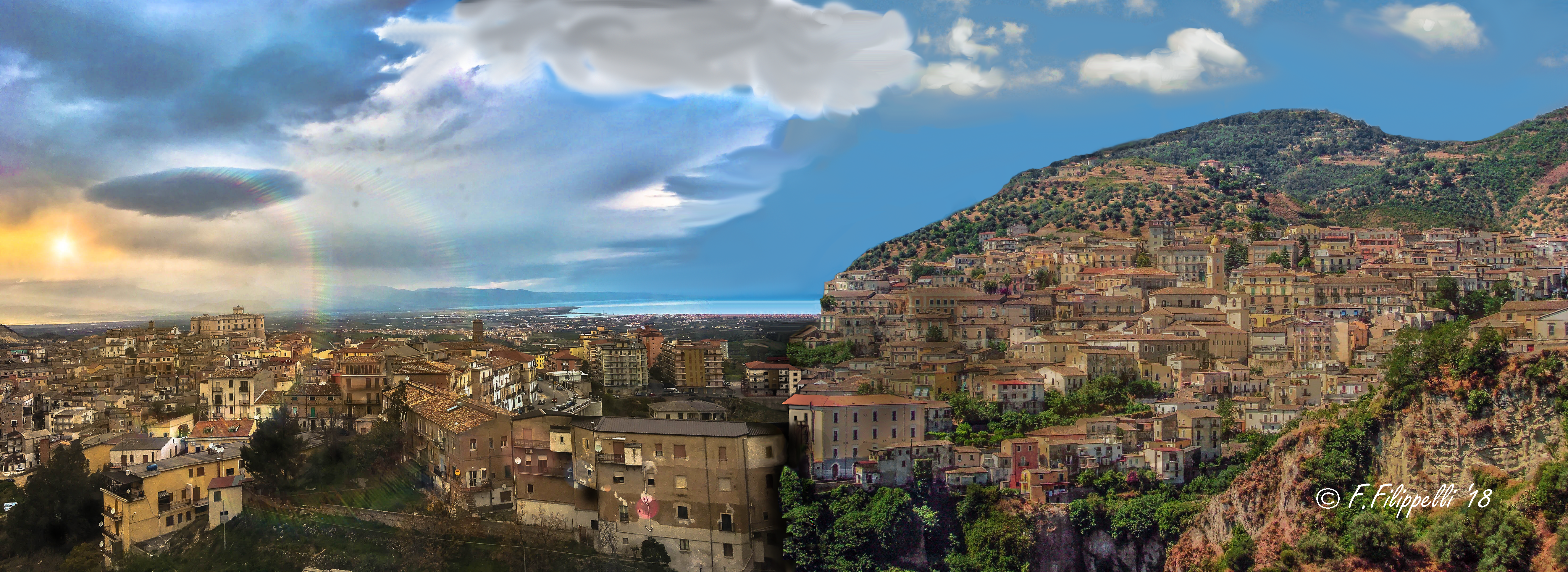 Il nuovo comune dato dalla fusione degli estinti comuni di Corigliano-Rossano